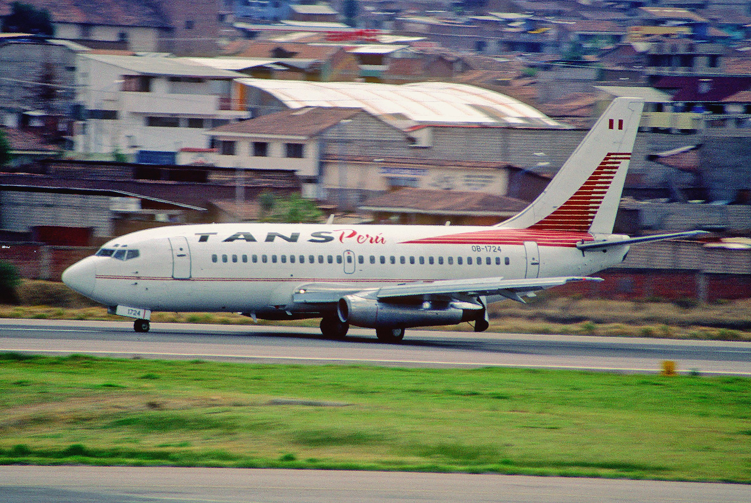 325aw - TANS Perú Boeing 737-282; OB-1724@CUZ;02.10.2004